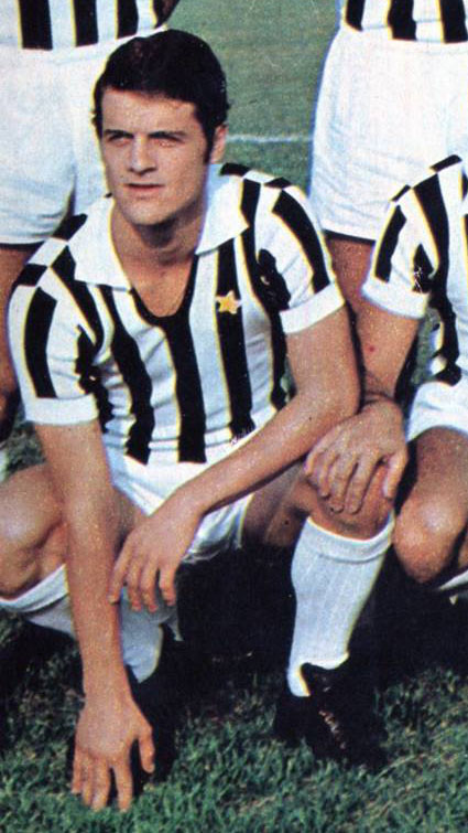 Verona, stadio Marcantonio Bentegodi, 11 ottobre 1970. Il calciatore italiano Fabio Capello alla Juventus, prima dell'inizio della sfida sul campo del Verona (0-0) valevole per la 3ª giornata del campionato italiano di Serie A 1970-71.